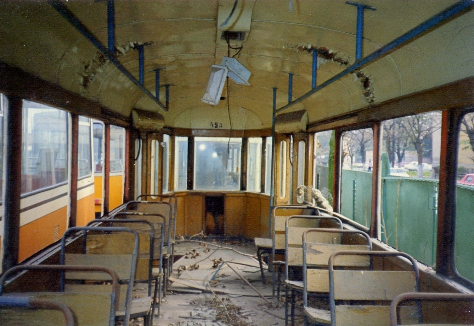 Tramvai Timisoara, vagon motor Pionier Nr. 453 la depou Ionescu